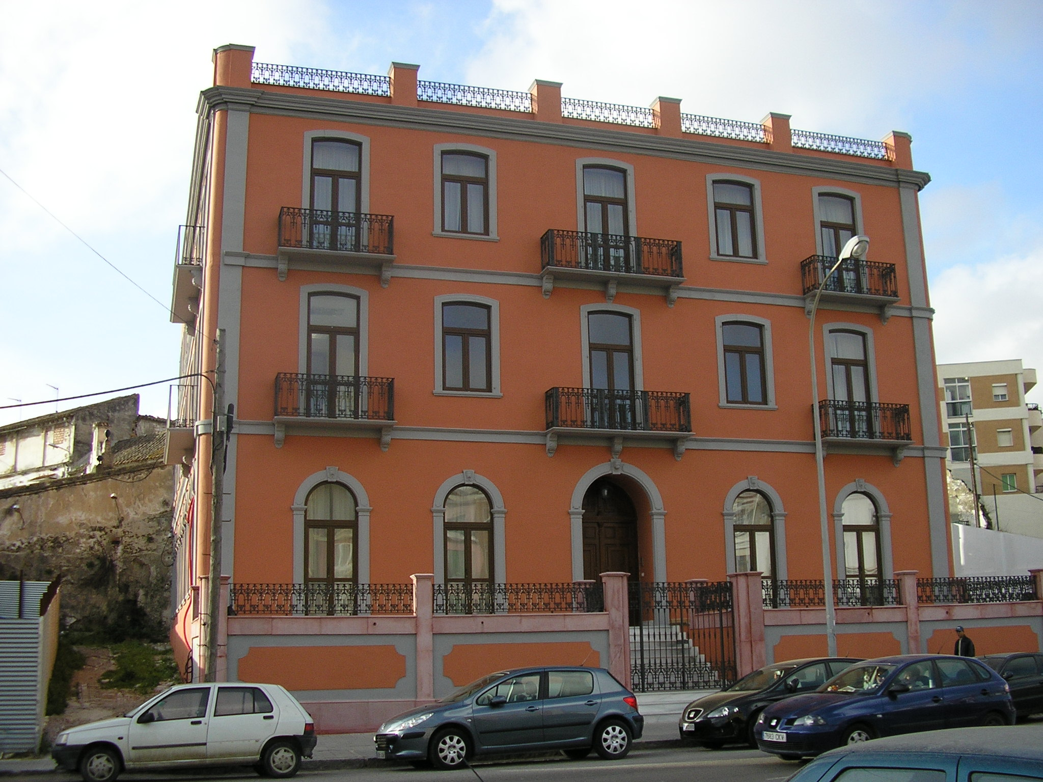 Fachada del Hotel Anglo-Hispano, en la localidad de Algeciras, Andalucía, España.